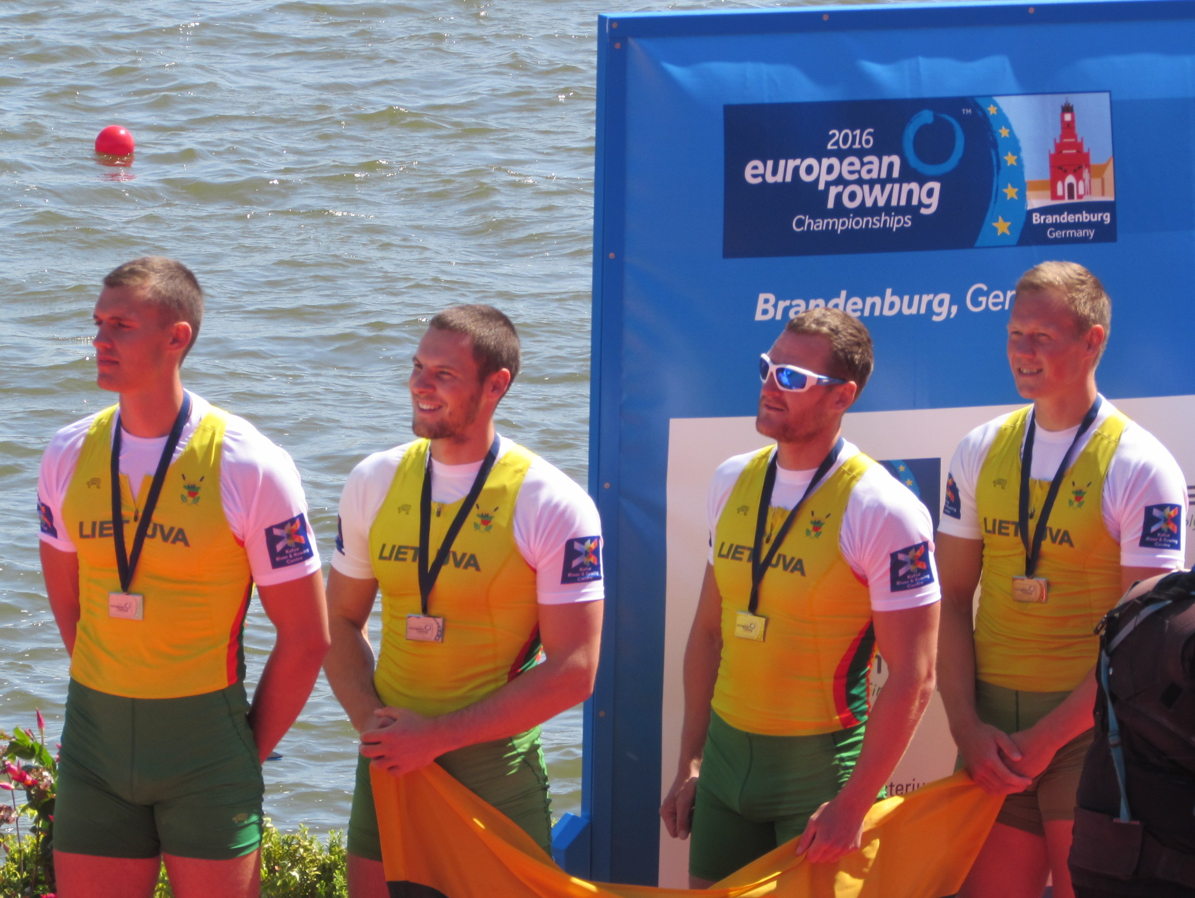 Dovydas Nemeravičius, Martynas Džiaugys, Dominykas Jančionis, Aurimas Adomavicius, Ruder-EM 2016